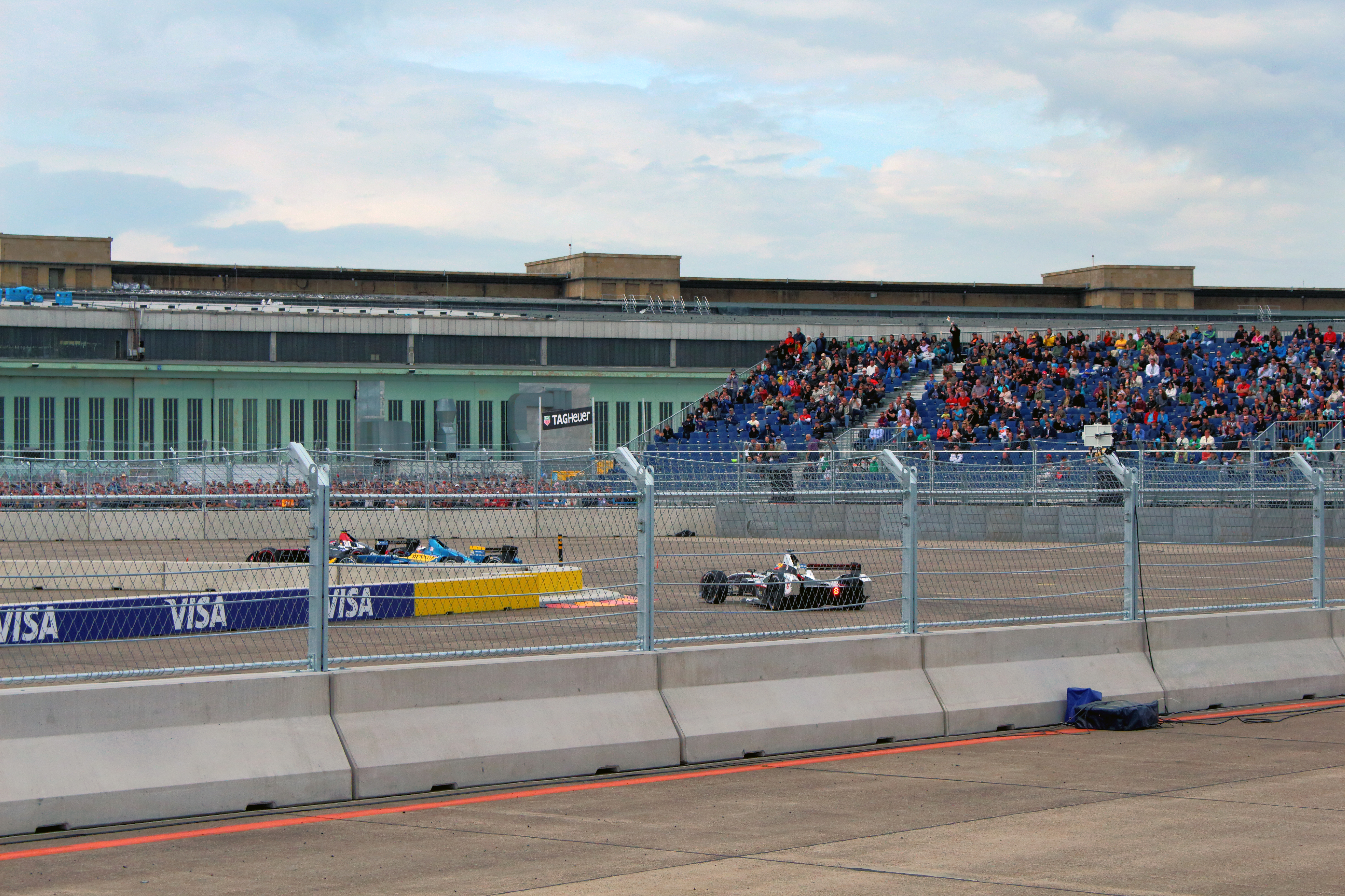 Formel E in Berlin-Tempelhof, Impression der Kurve 10